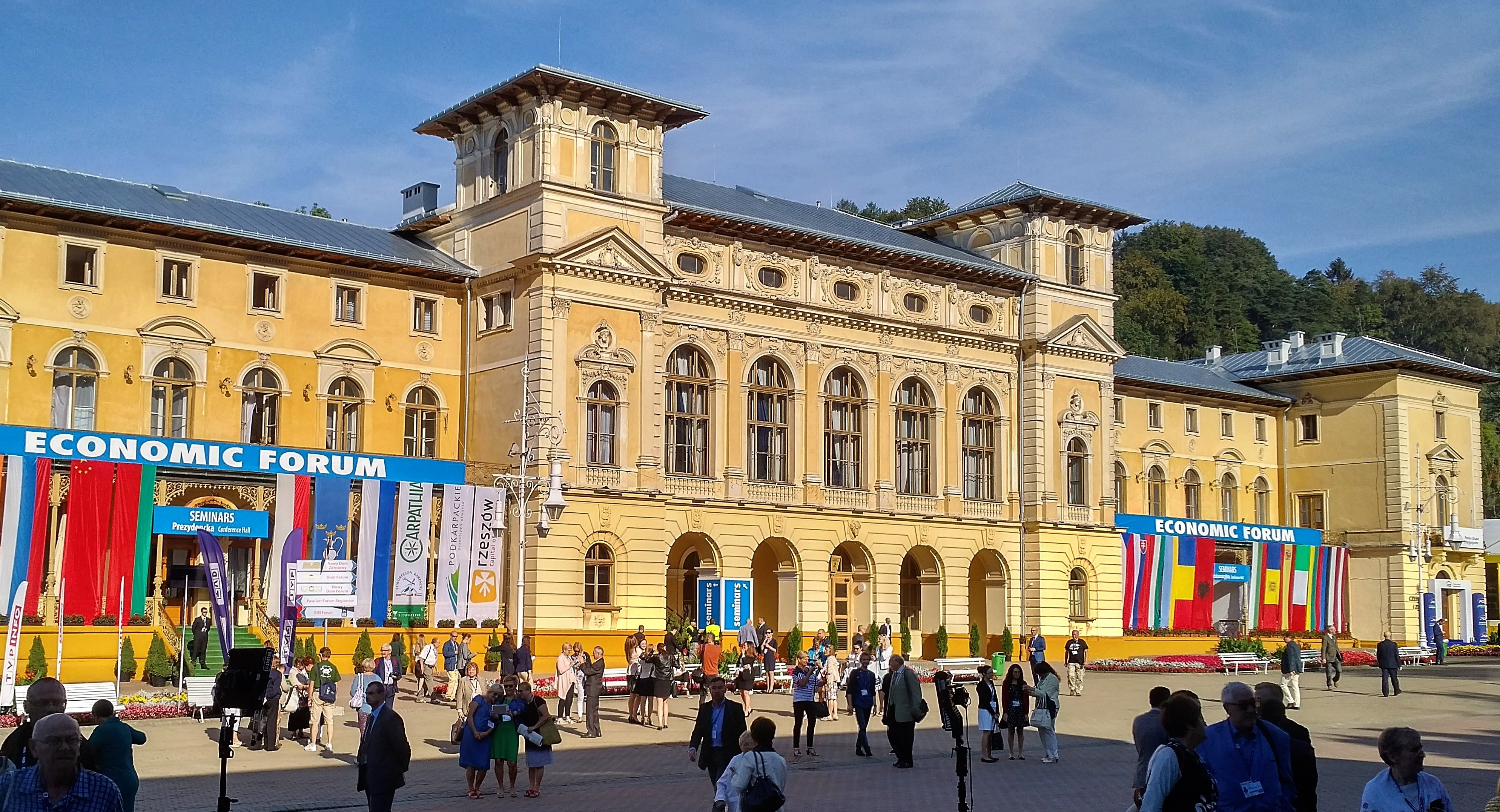 XXVI Forum Ekonomiczne w Krynicy – Stary Dom Zdrojowy (8 września 2016)